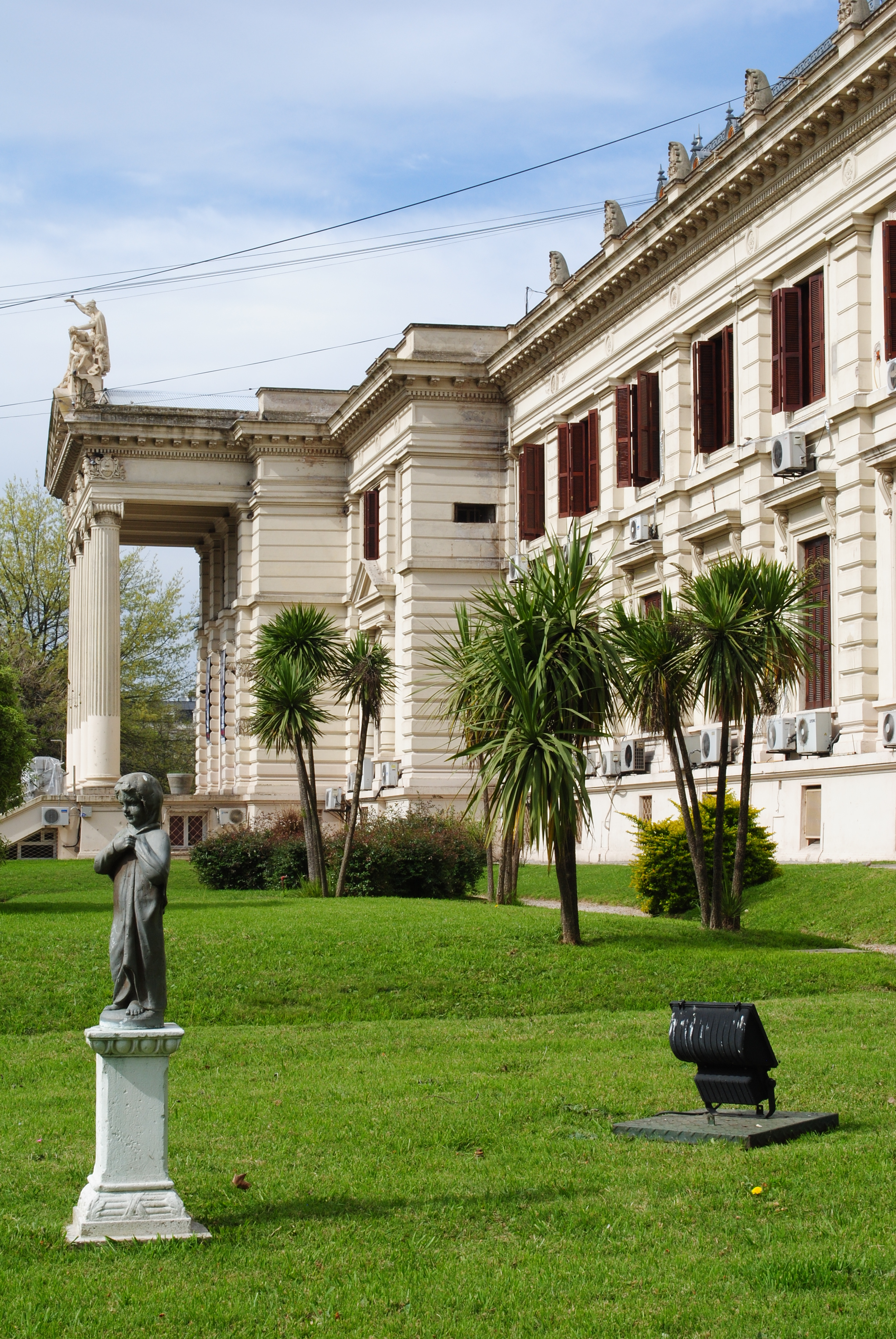 Palacio Legislativo